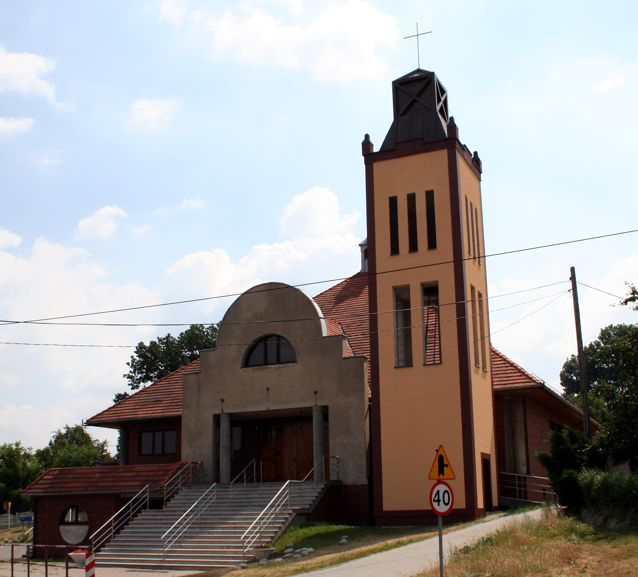 Kościół św. Jana Nepomucena w Rybnicku Chwałęcicach